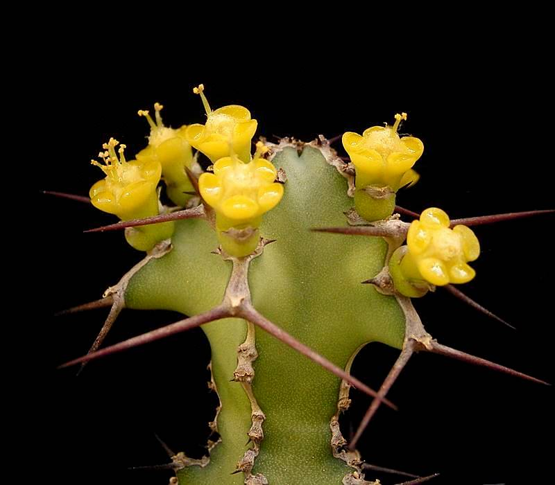 Euphorbia leontopoda